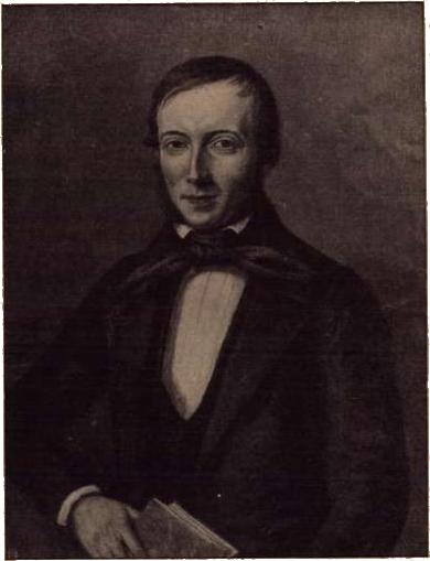 Professor Peter Jonas Collett (1813–1851). Maleri av J. Gørbitz.